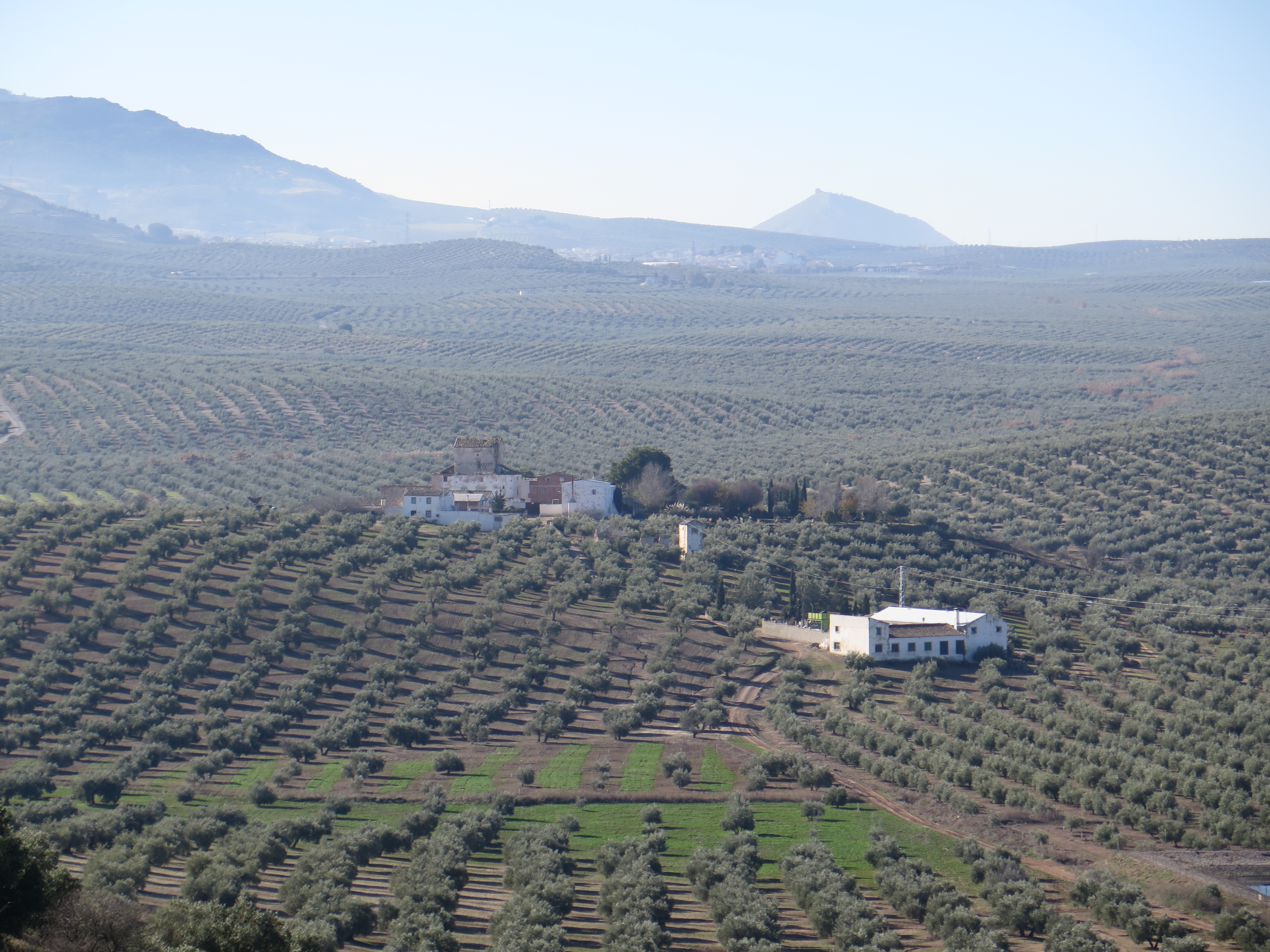 Aldea de El Término, junto al cortijo de la Dehesilla en primer término.